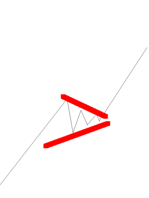 Bullisher Winkel im Beispielchart.